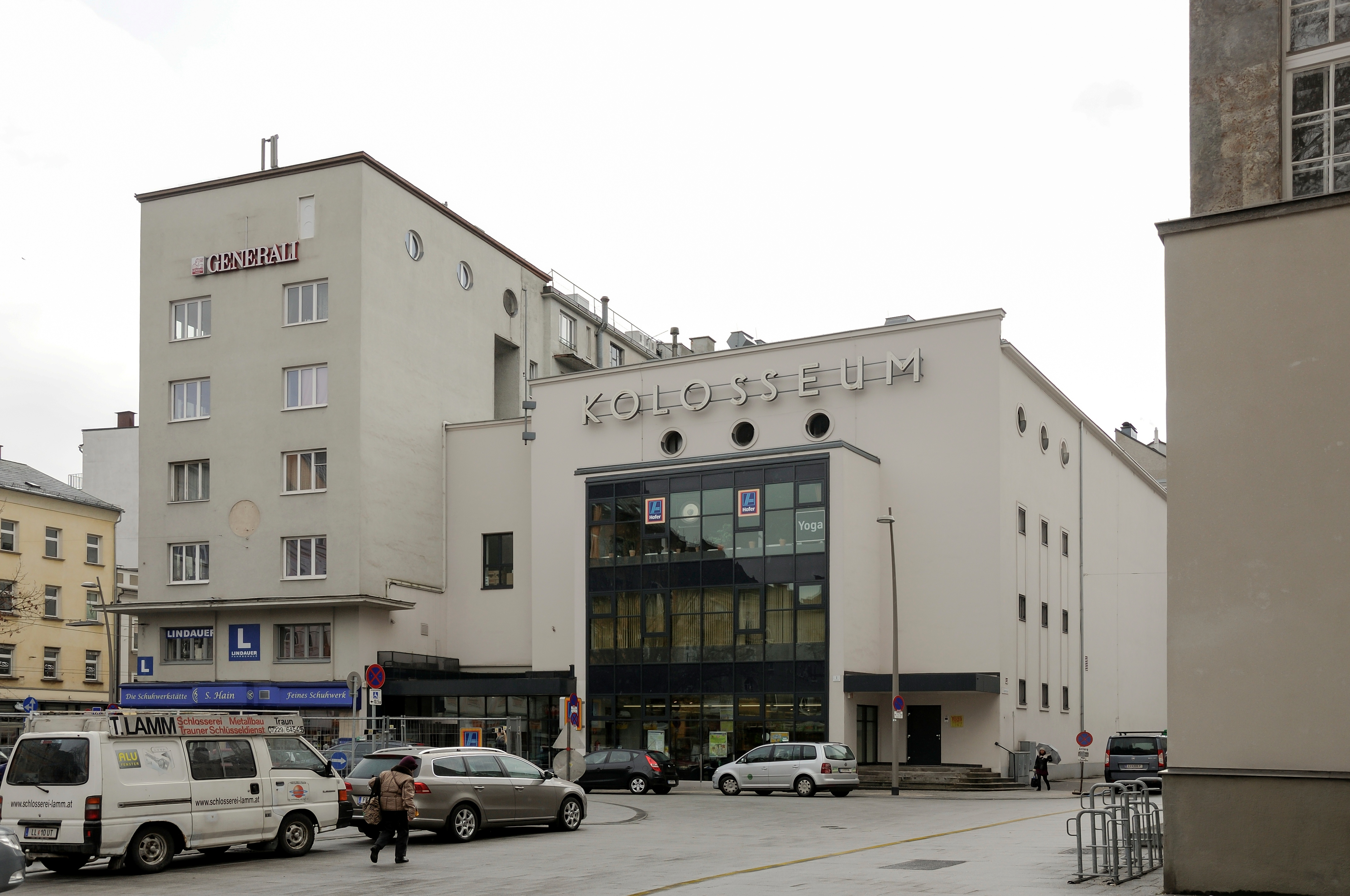 Das Kolosseum, ein ehemaliges Kino und daneben der sogenannte Riunionebau.